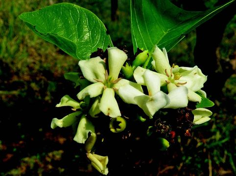 Deccania pubescens var candolleana